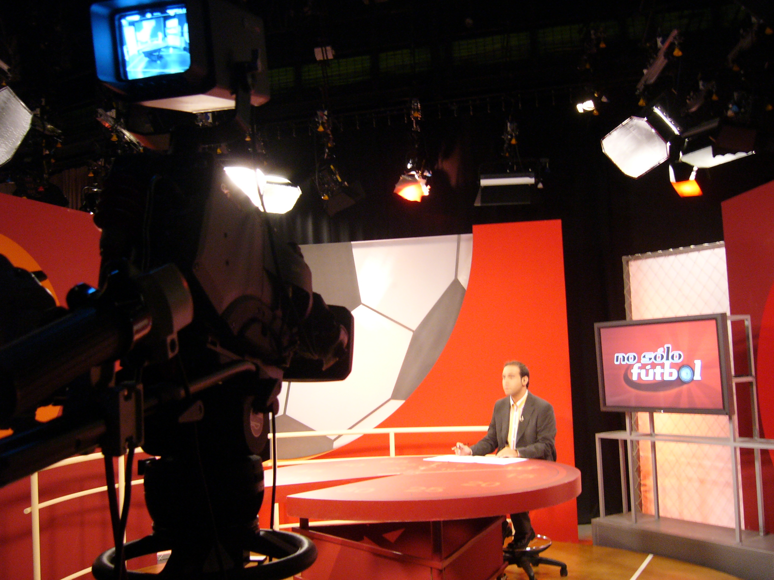 Plató de programes de TPA demientres la emisión de No sólo fútbol.